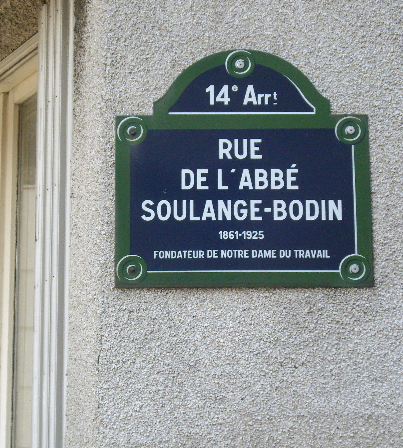 Rue de l'Abbé-Soulange-Bodin, Paris 14e. « Abbé Soulange Bodin, 1861-1925, fondateur de Notre-Dame-du-Travail . »